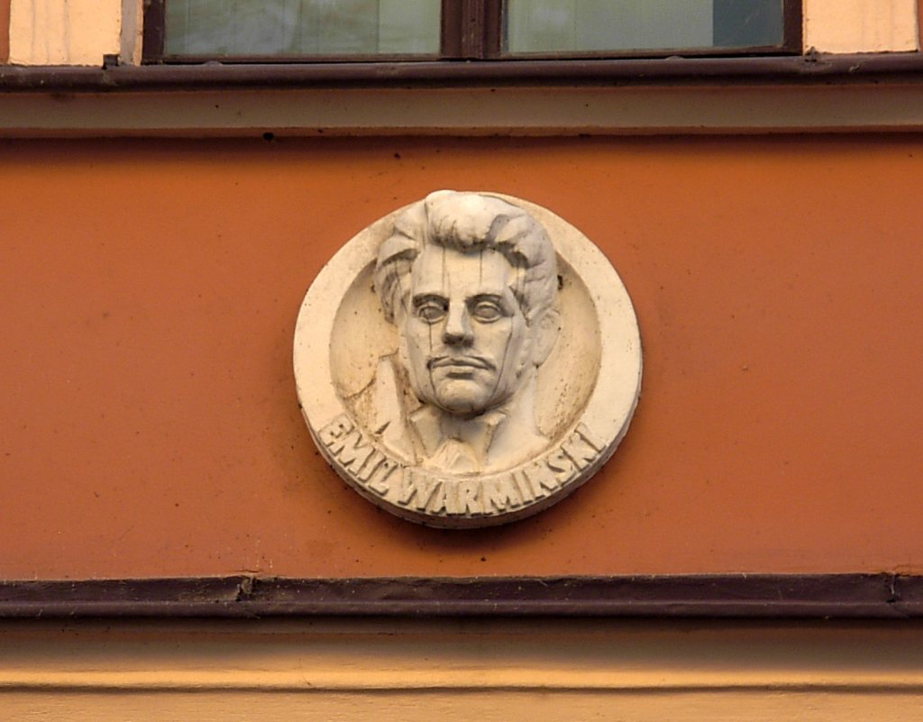 Jezuicka 2 Bydgoszcz - medalion Emil Warmiński